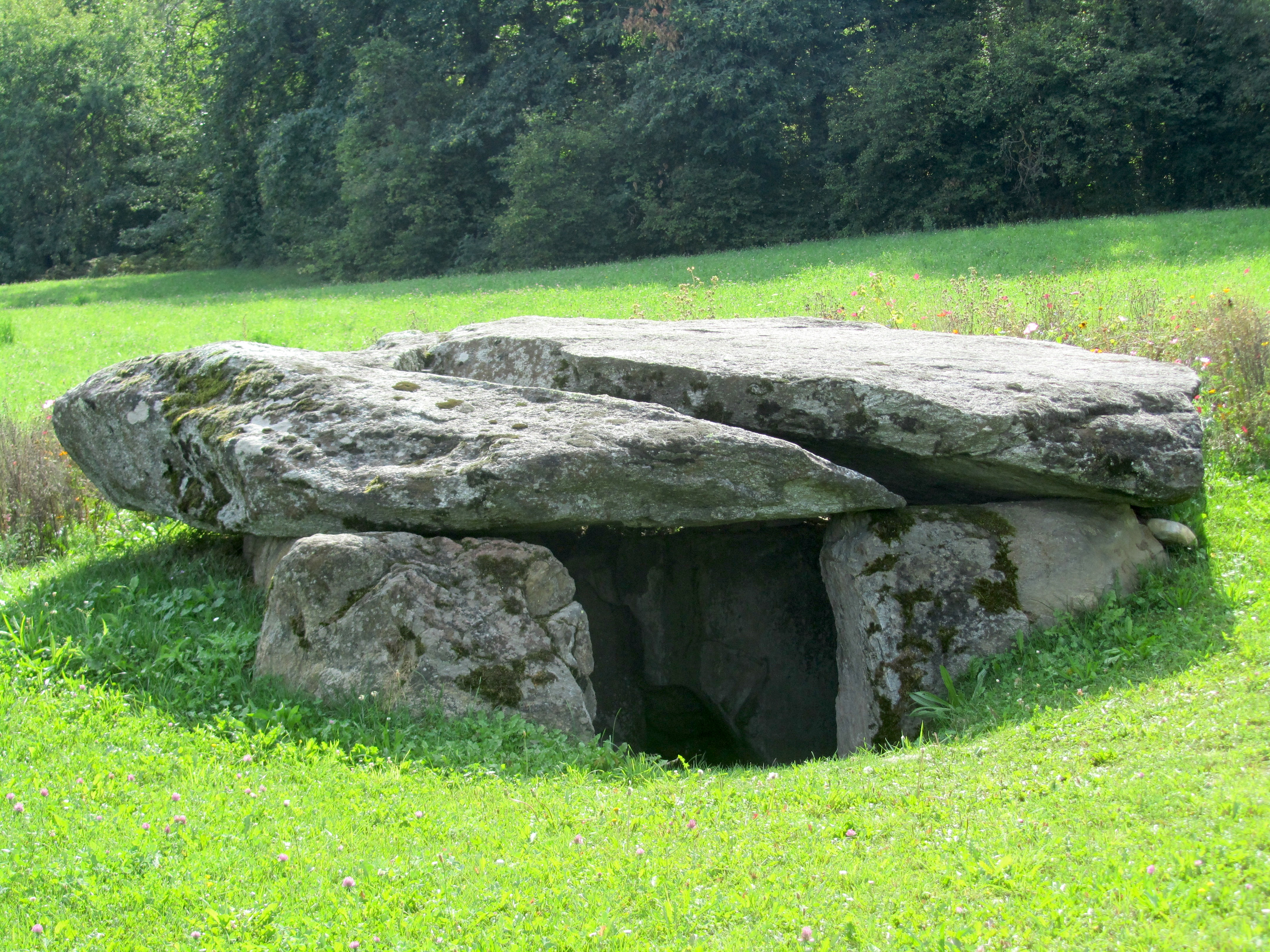 Dolmen de Saint-Cergues (Haute-Savoie), dit La Cave ou Chambre aux Fées